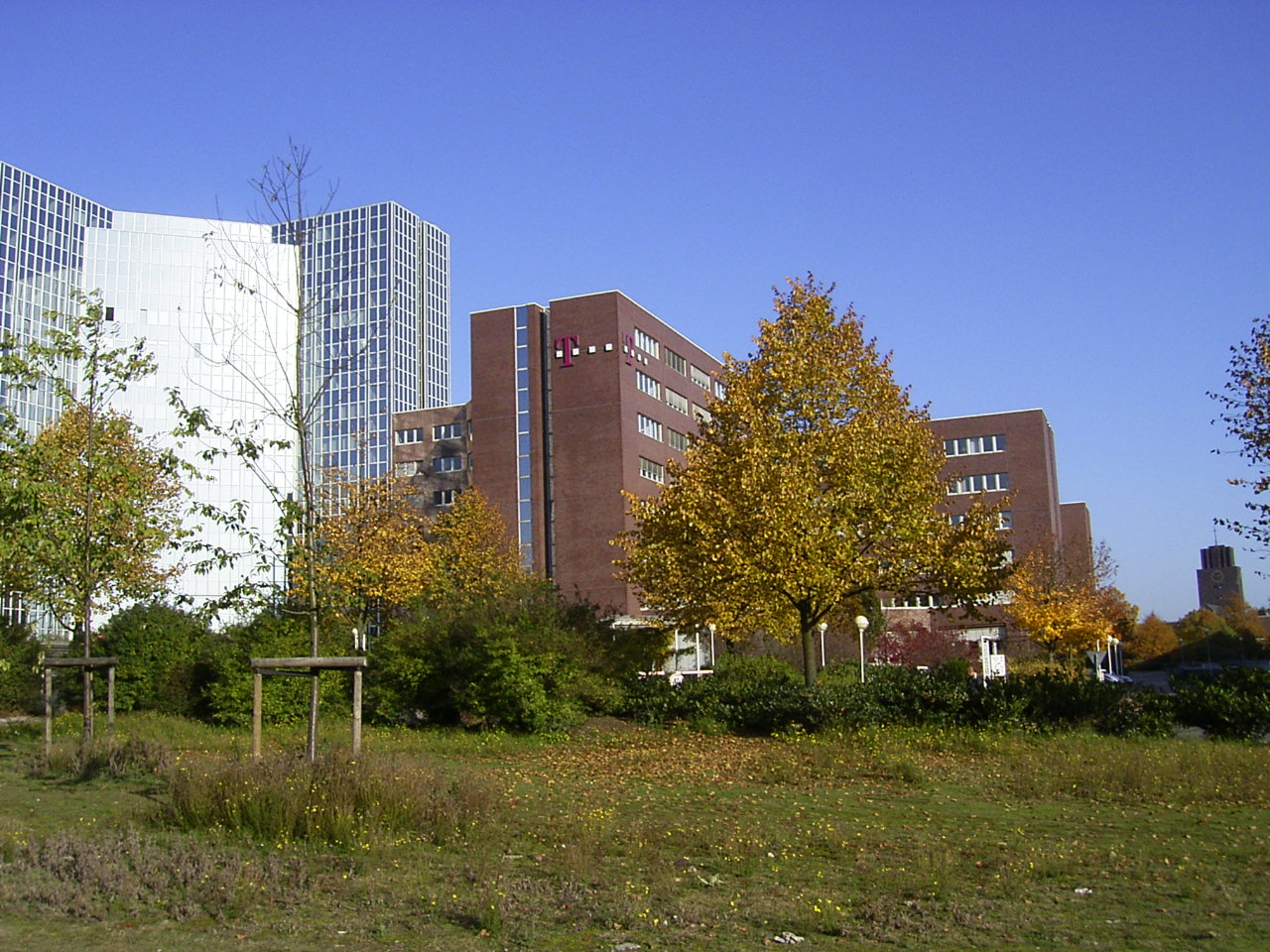 Alster-City auf dem Gelände der ehemaligen Gasanstalt in Hamburg-Barmbek-Süd, im Hintergrund ist die Bugenhagenkirche zu sehen.